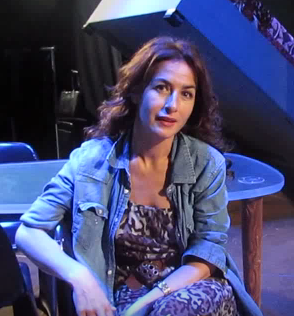 La actriz española Belén López